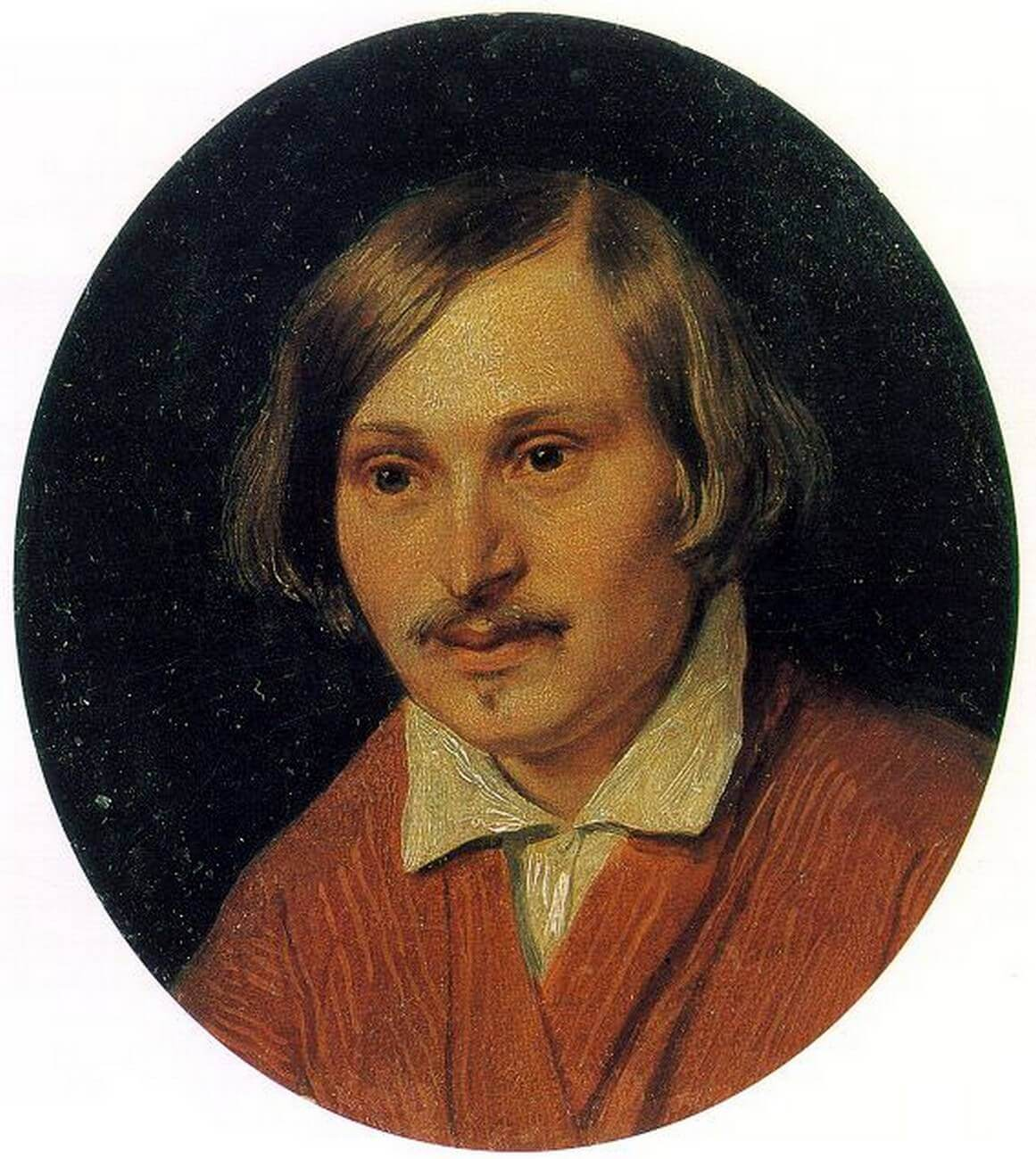 Nikolai Gogol А. И. Иванов. Портрет Николая Гоголя, 1841 Русский Музей, С.-Петербург